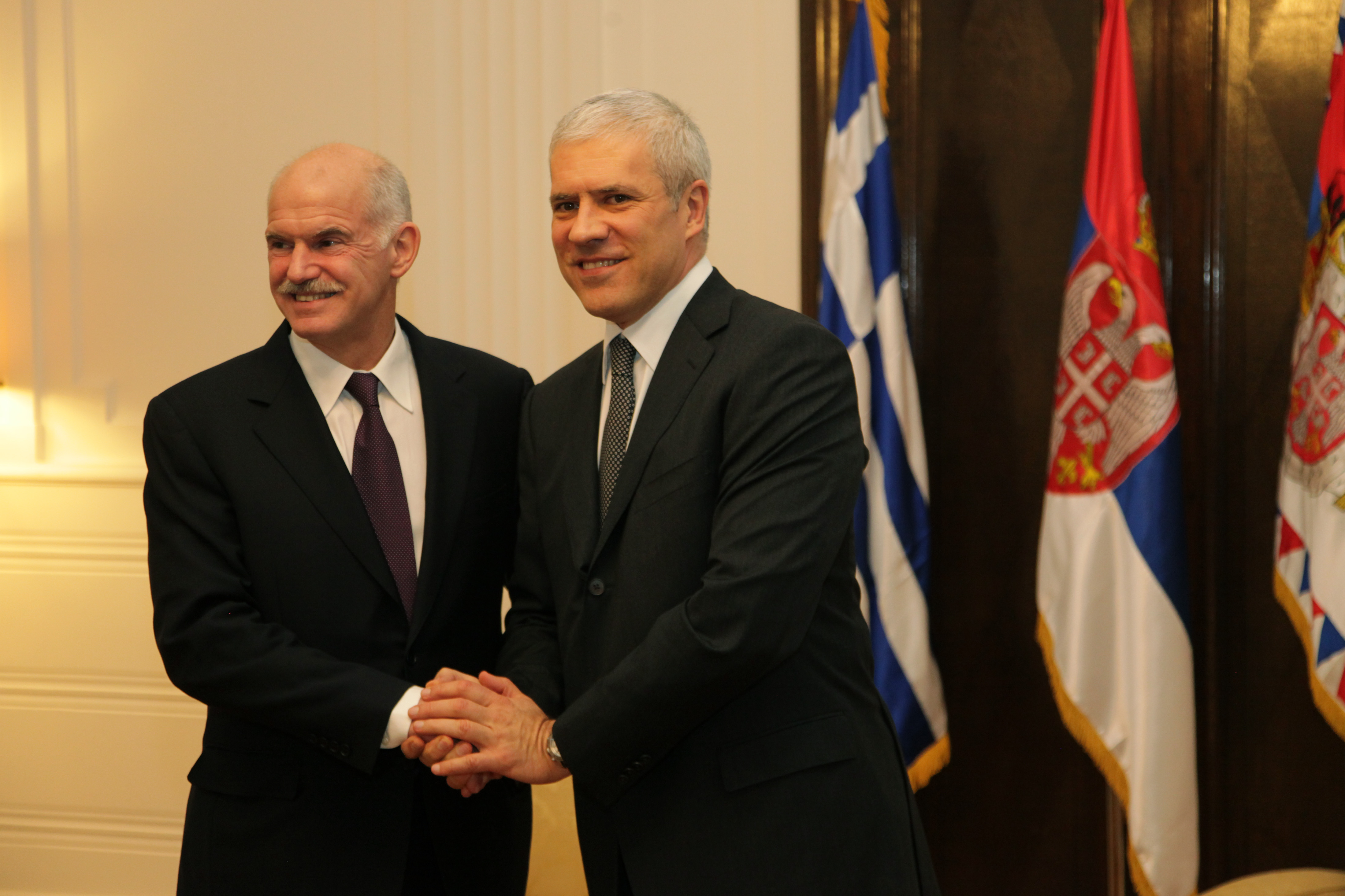 Papandreou-Tadic, Belgrade 2010